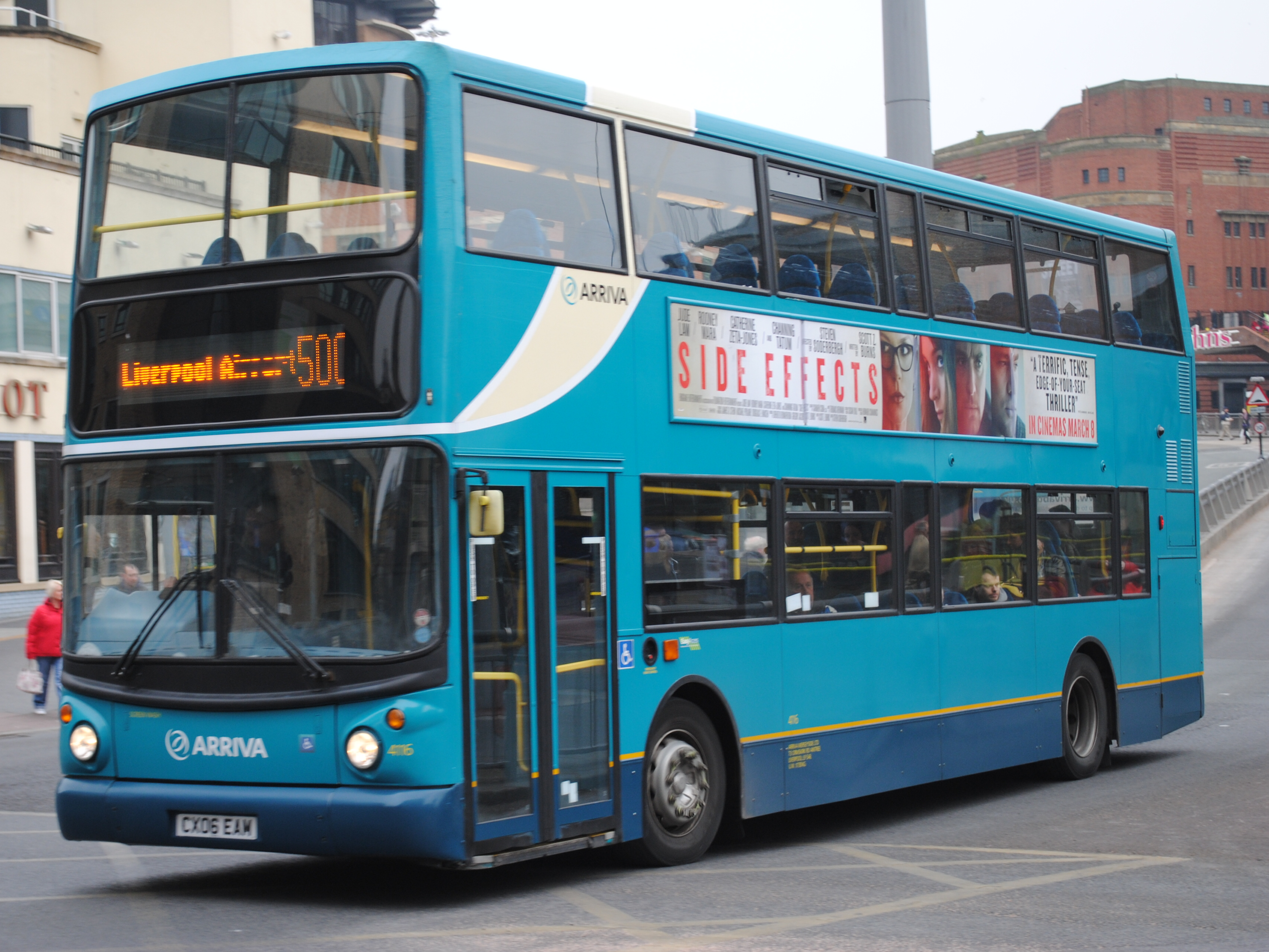 Volvo B7TL Alexander Dennis ALX400